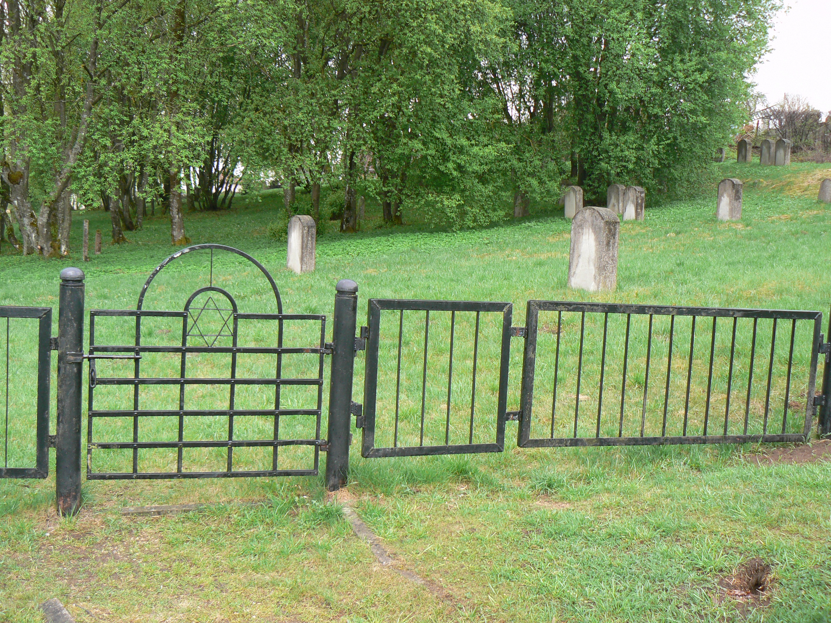 Židovský hřbitov v GargždechLietuvių: Žydų kapinės Gargžduose